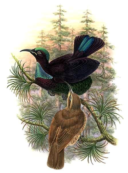 Ptiloris victoriae